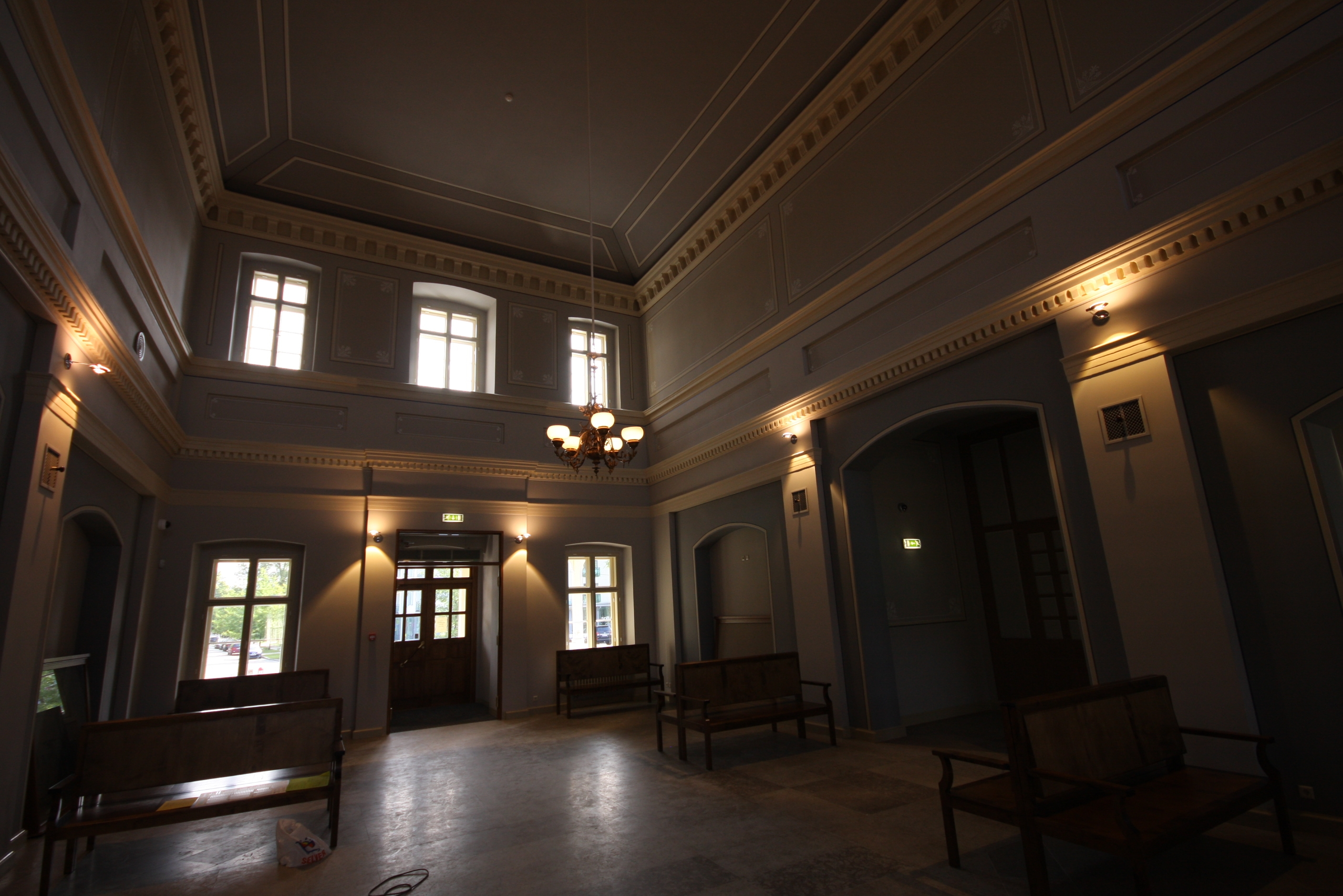 Tartu raudteejaama renoveeritud ootesaali üldvaade, 24.07.2012. Foto: Indrek Mustimets.